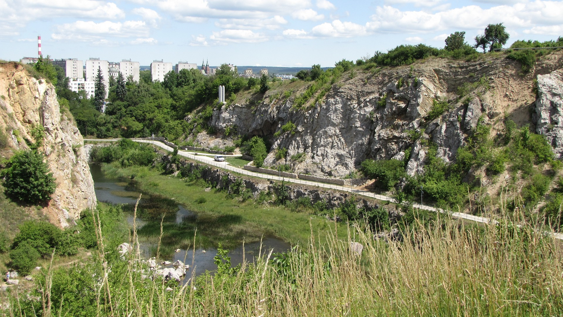 Widok z Kadzielni w kierunku pn-wsch.